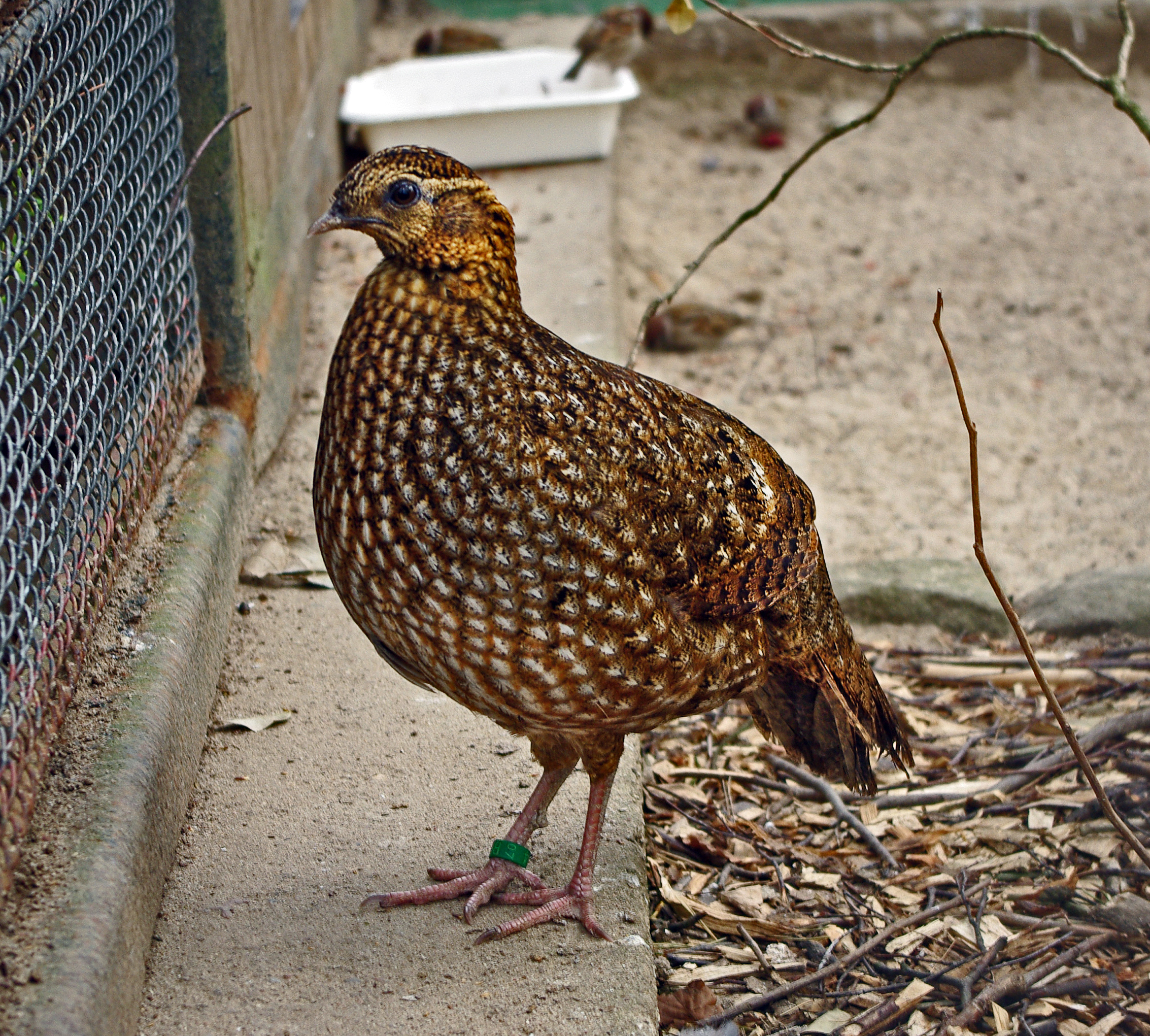 Tragopan temminckii - samica